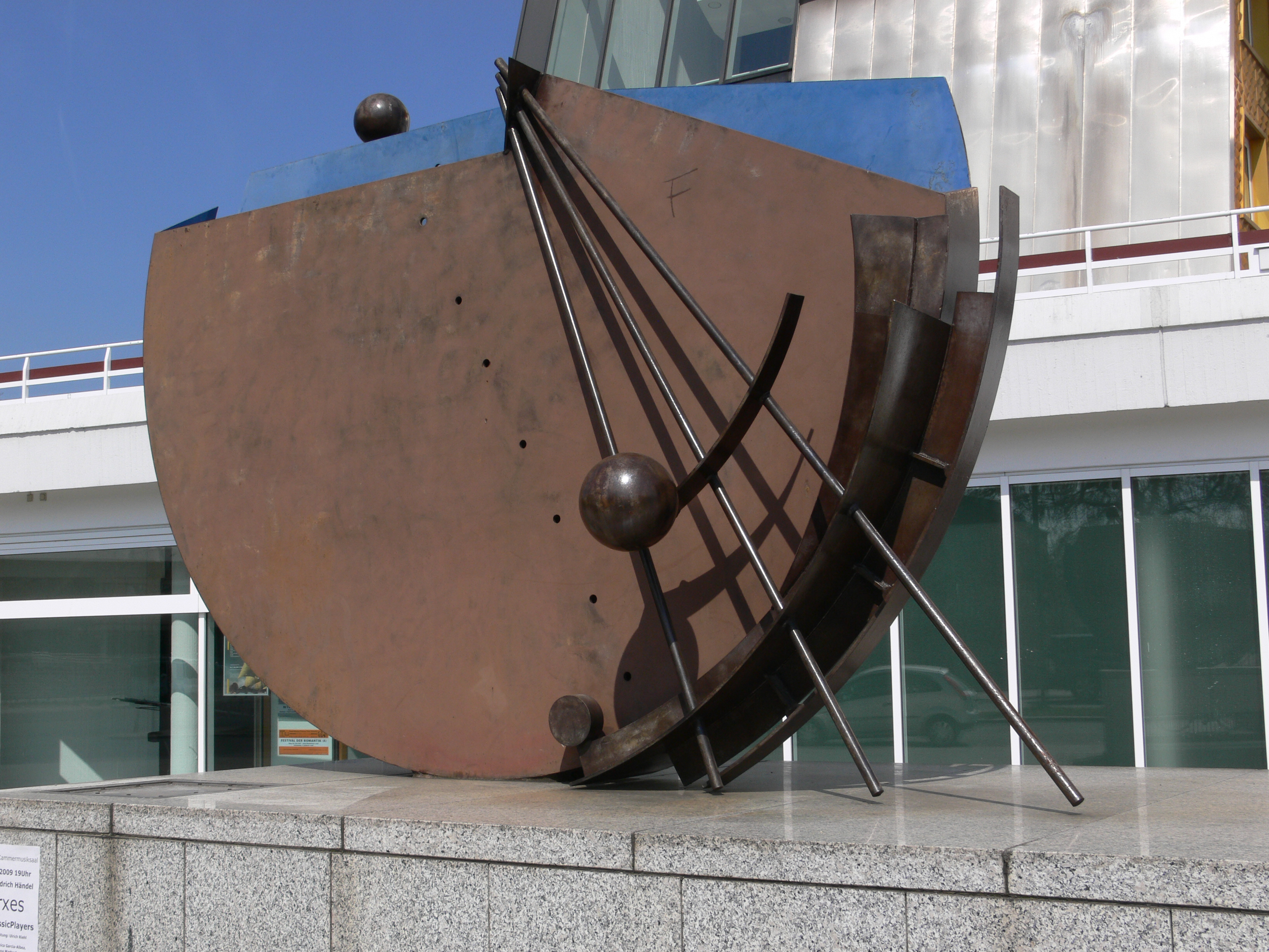 Bernhard Heiliger: Echo I. 1987, Eisen. Herbert-von-Karajan-Straße (vor dem Kammermusiksaal der Philharmonie), Berlin-Tiergarten